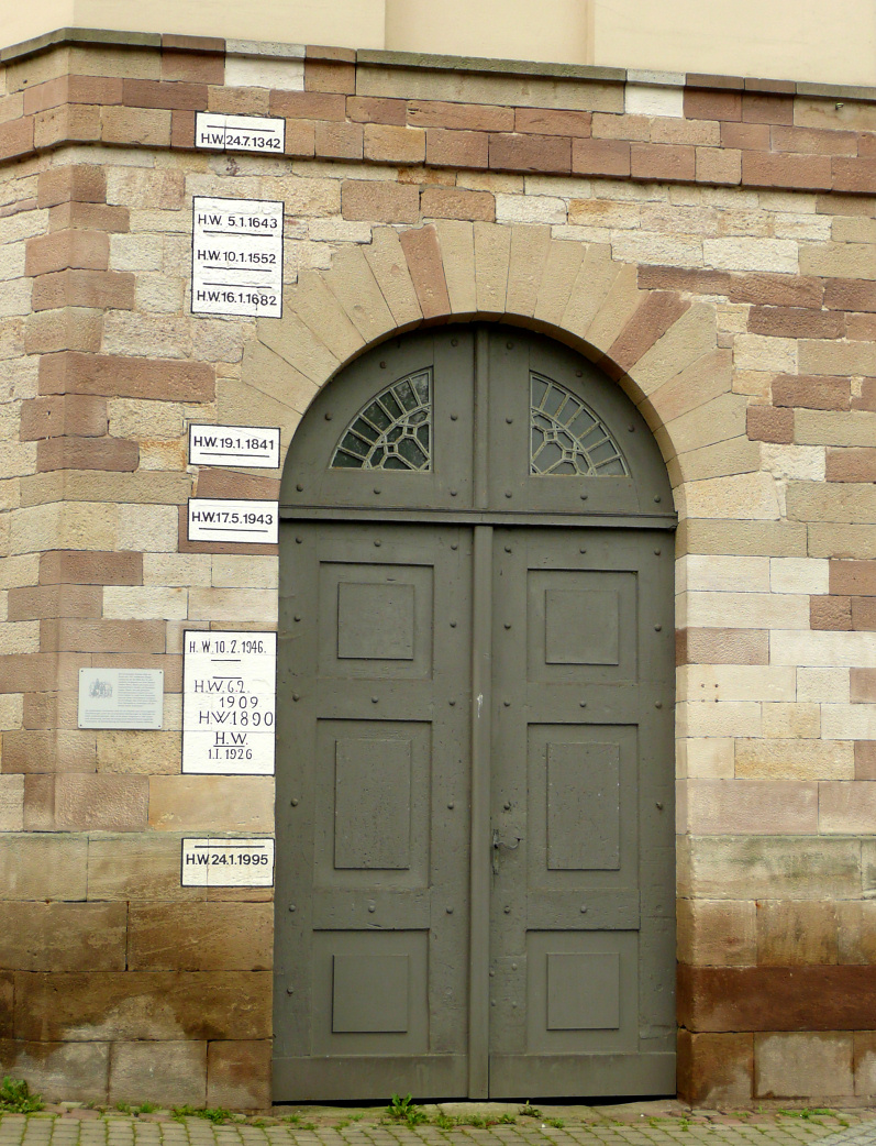 Münden Hochwasserstände am Packhof